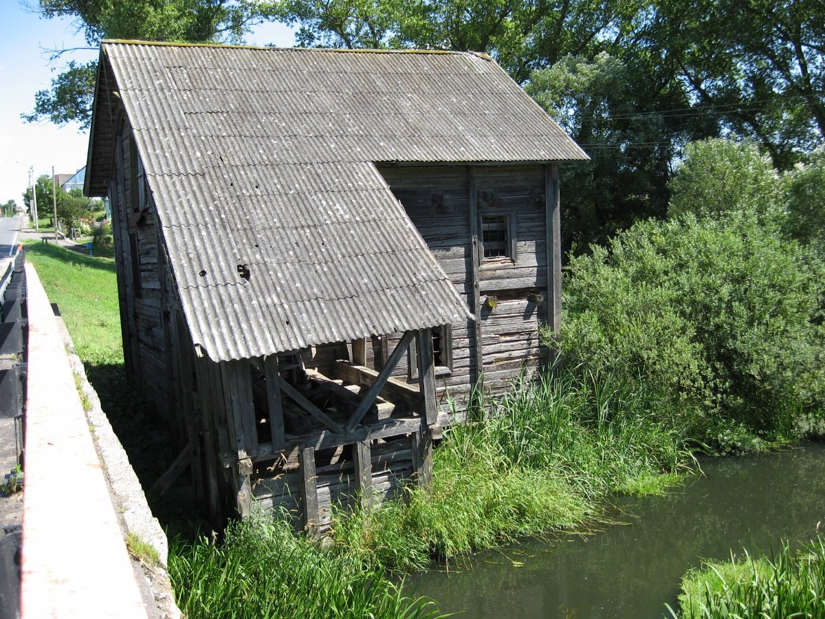 Гальшаны. Вадзяны млын